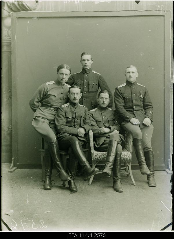 1. Eesti polgu ohvitserid. Paremalt esimene leitnant Albert Peters ja seisab leitnant Jaan Lepp